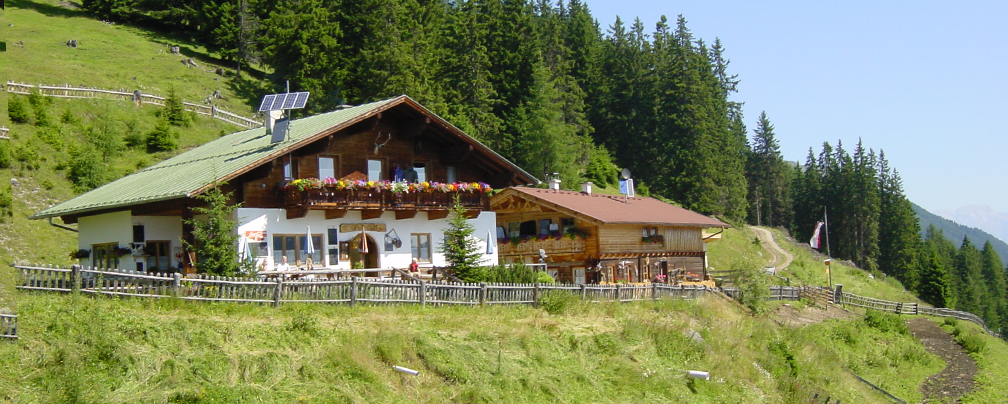 Gasthaus auf der Galtalm oberhalb von Fulpmes im Stubaital.